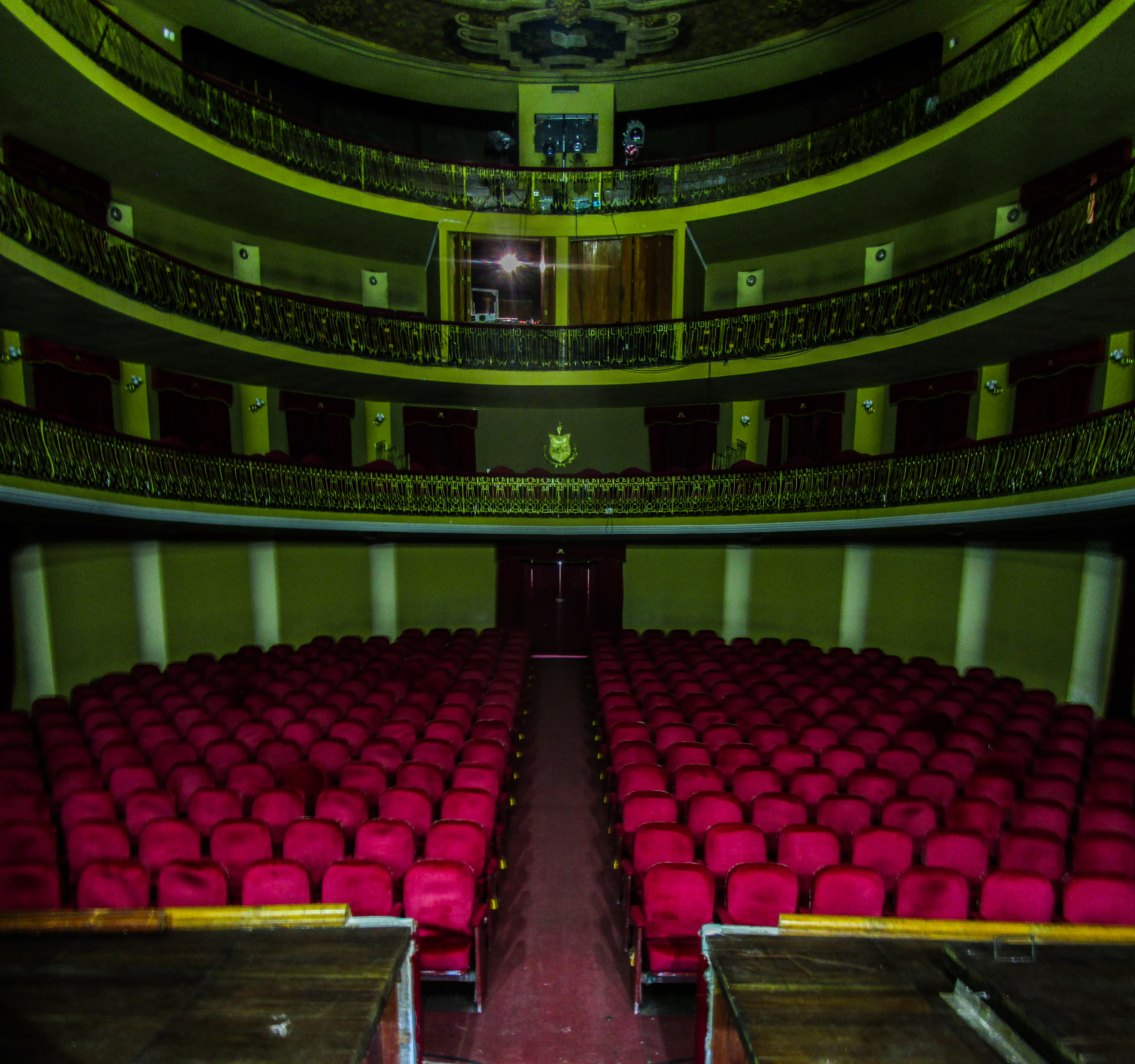 Teatro Municipal Alberto Saavedra Pérez This medium shows the protected monument with the number L/00-044 in Bolivia.